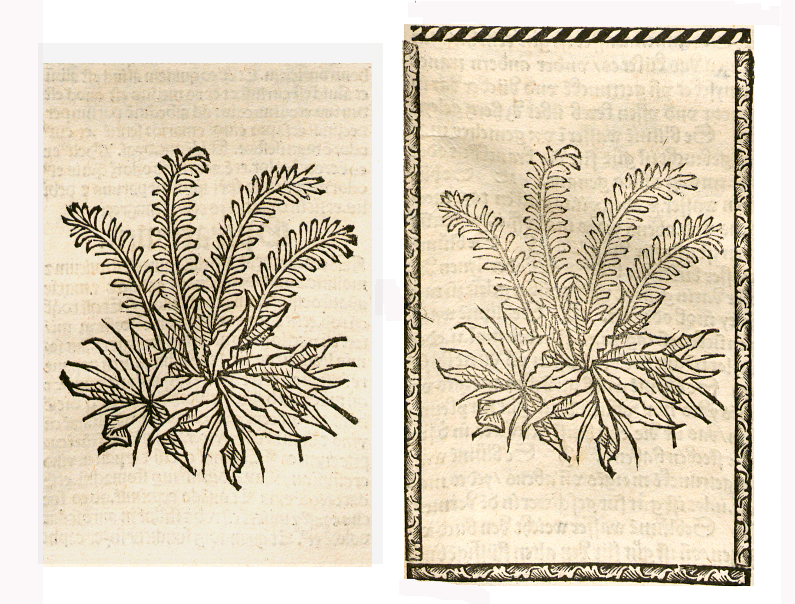 Abbildung vonː Steyn Kle (Melilotus officinalis)